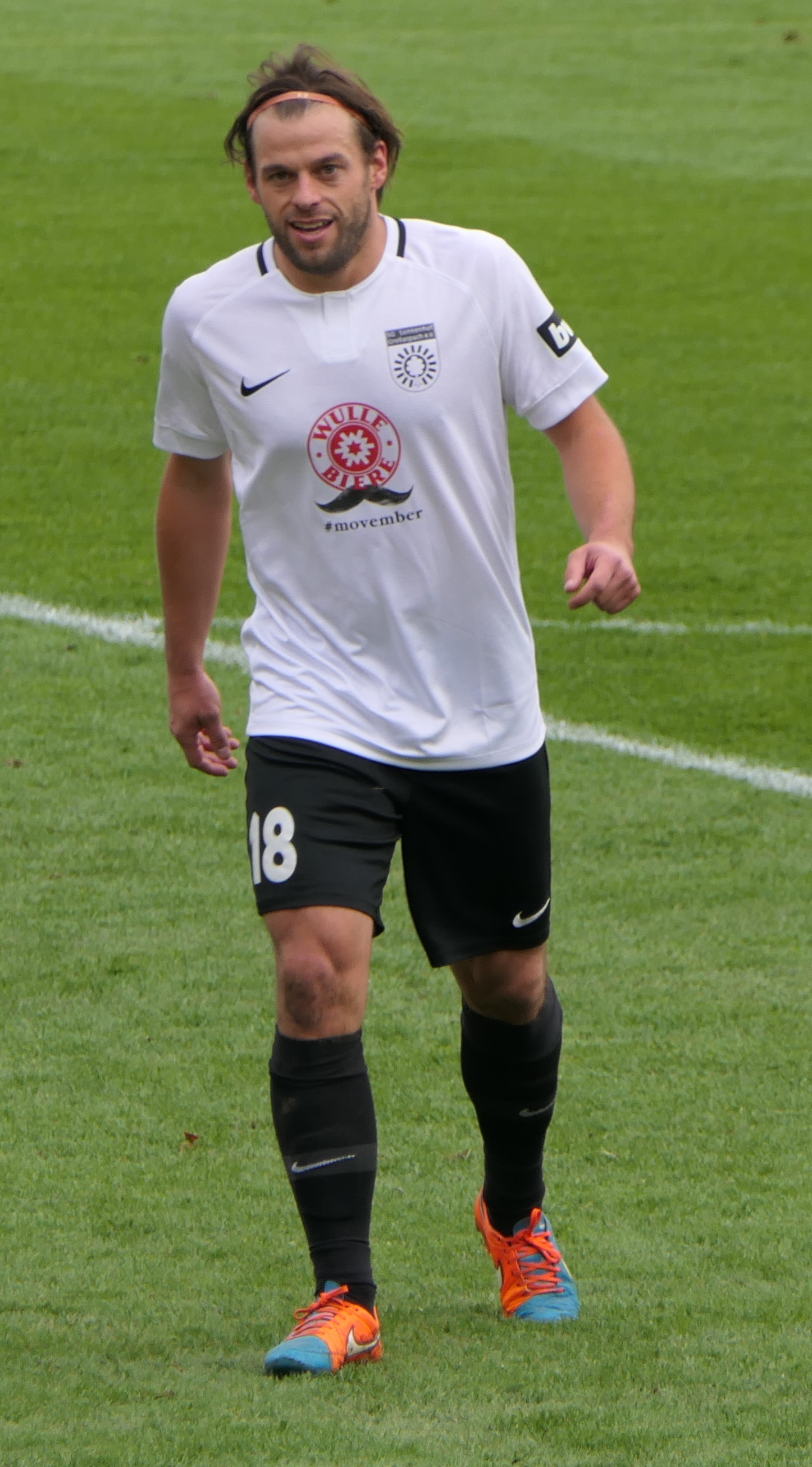 Der Fussballprofi Timo Röttger im Trikot der SG Sonnenhof Großaspach beim Heimspiel gegen Eintracht Braunschweig am 03.11.2018.